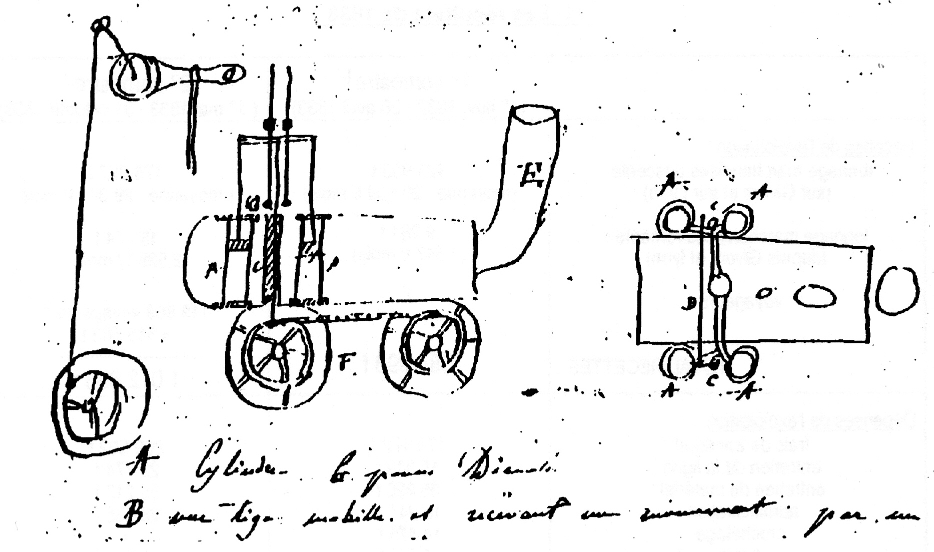 Locomotive "Chittaprat" de Robert Wilson & C°.